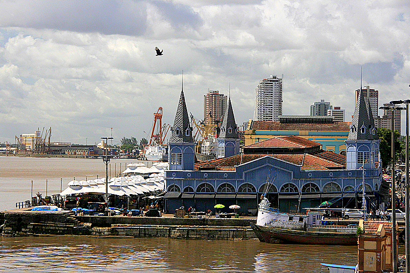 Ver-o-Peso market in Belém, Brazil